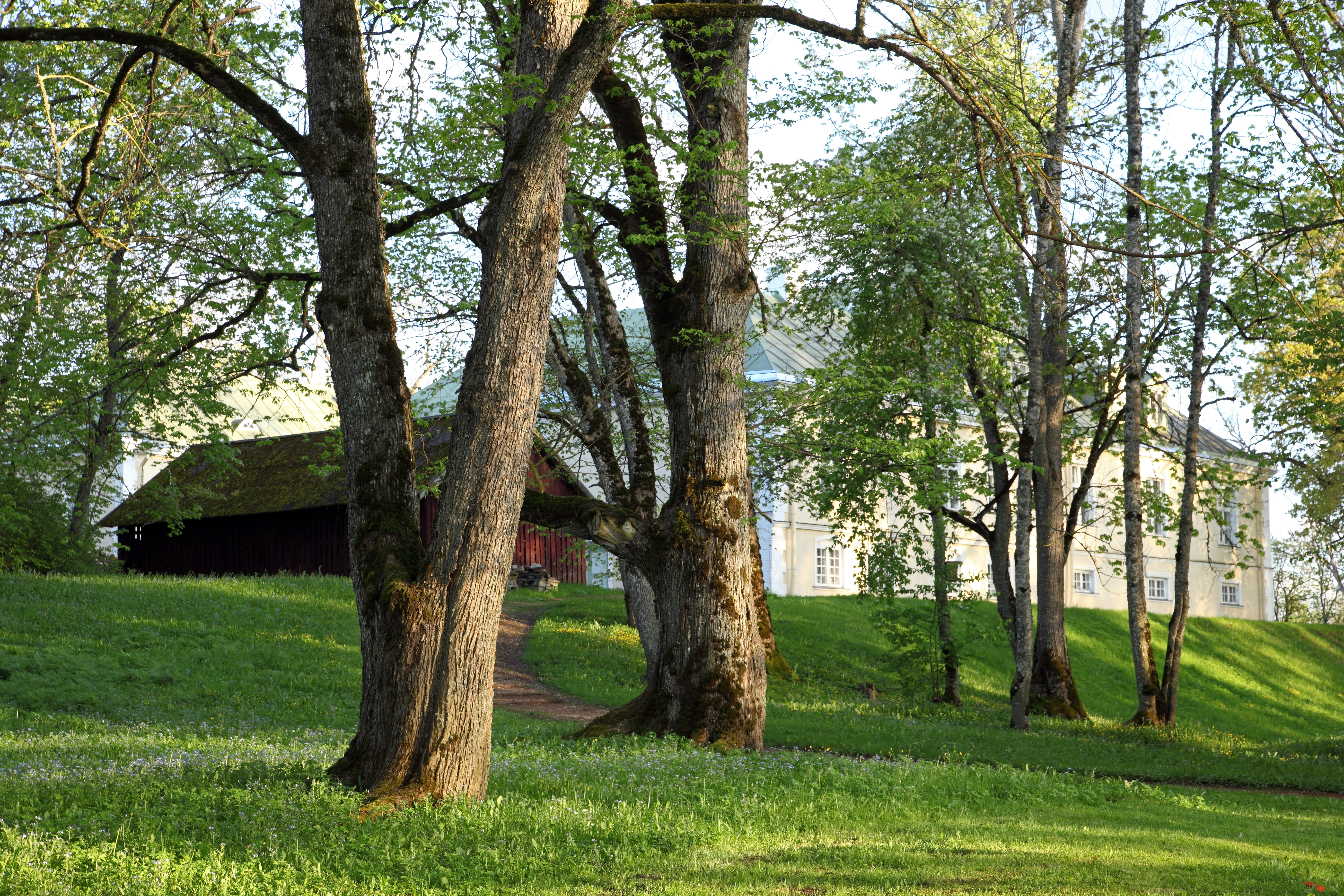 Albu mõisa park